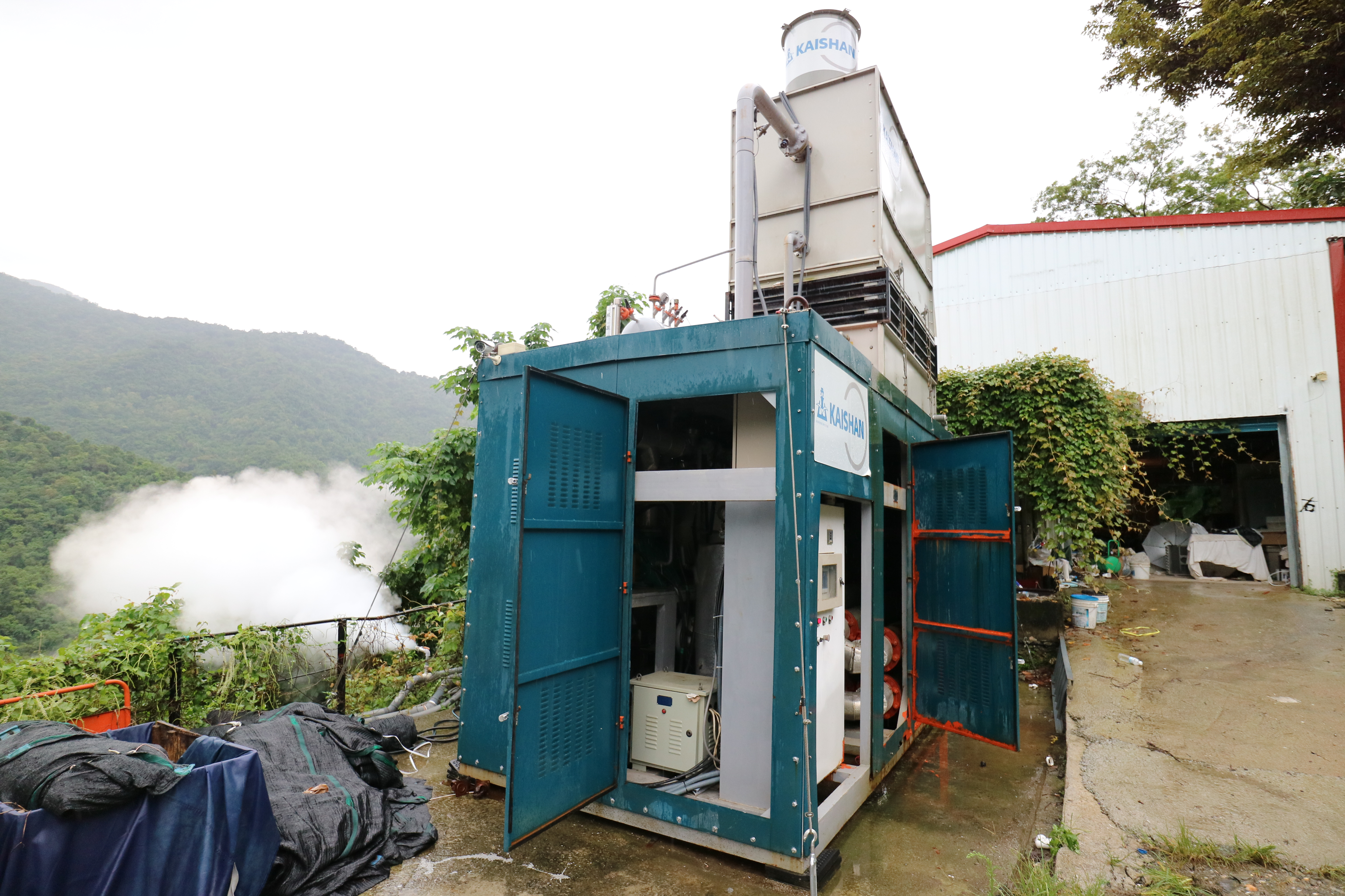 泓泉溫泉渡假村地熱發電廠有機朗肯循環發電機組